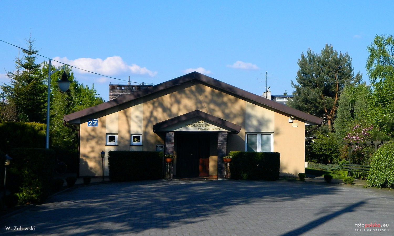 Sala Królestwa Świadków Jehowy Legionowo